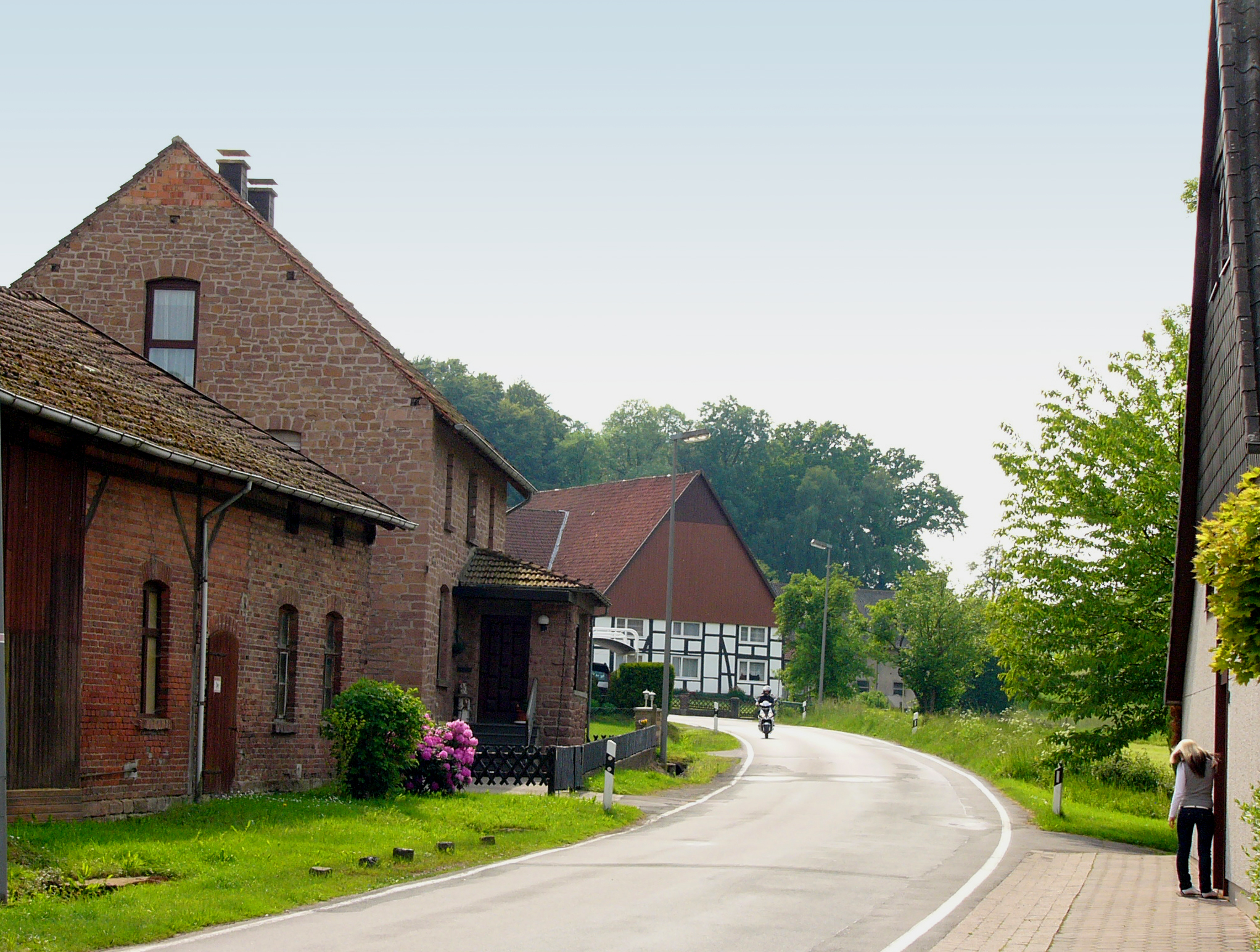 Dorfstraße in Dalborn, Ortsteil von Blomberg, Germany